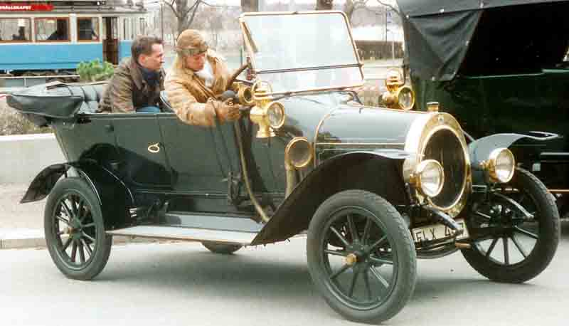 NAG Darling K2 6/18 PS Doppelphaeton 1912